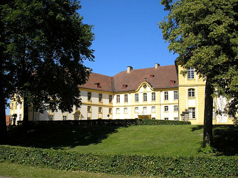 Schloss Rentweinsdorf (Landkreis Haßberge, Unterfranken) / Rentweinsdorf Castle, Franconia, Germany. Gesamtansicht / Total view. Eigene Aufnahme, Juni 2006 / Own photo, June 2006